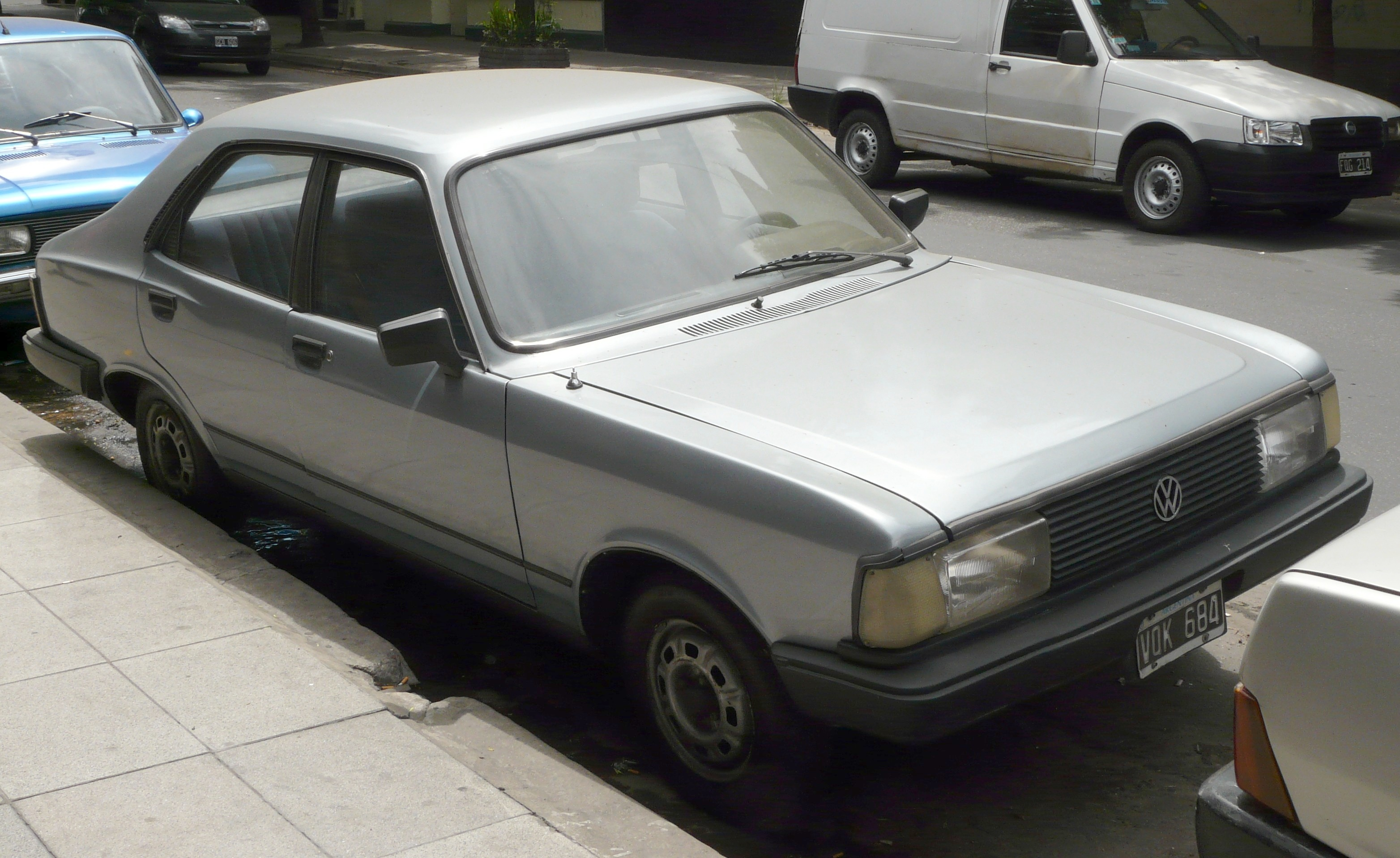 Volkswagen 1500 (rebadged Dodge 1500/Hillman Avenger) and Fiat Fiorino, Buenos Aires, Argentina, November 2008.